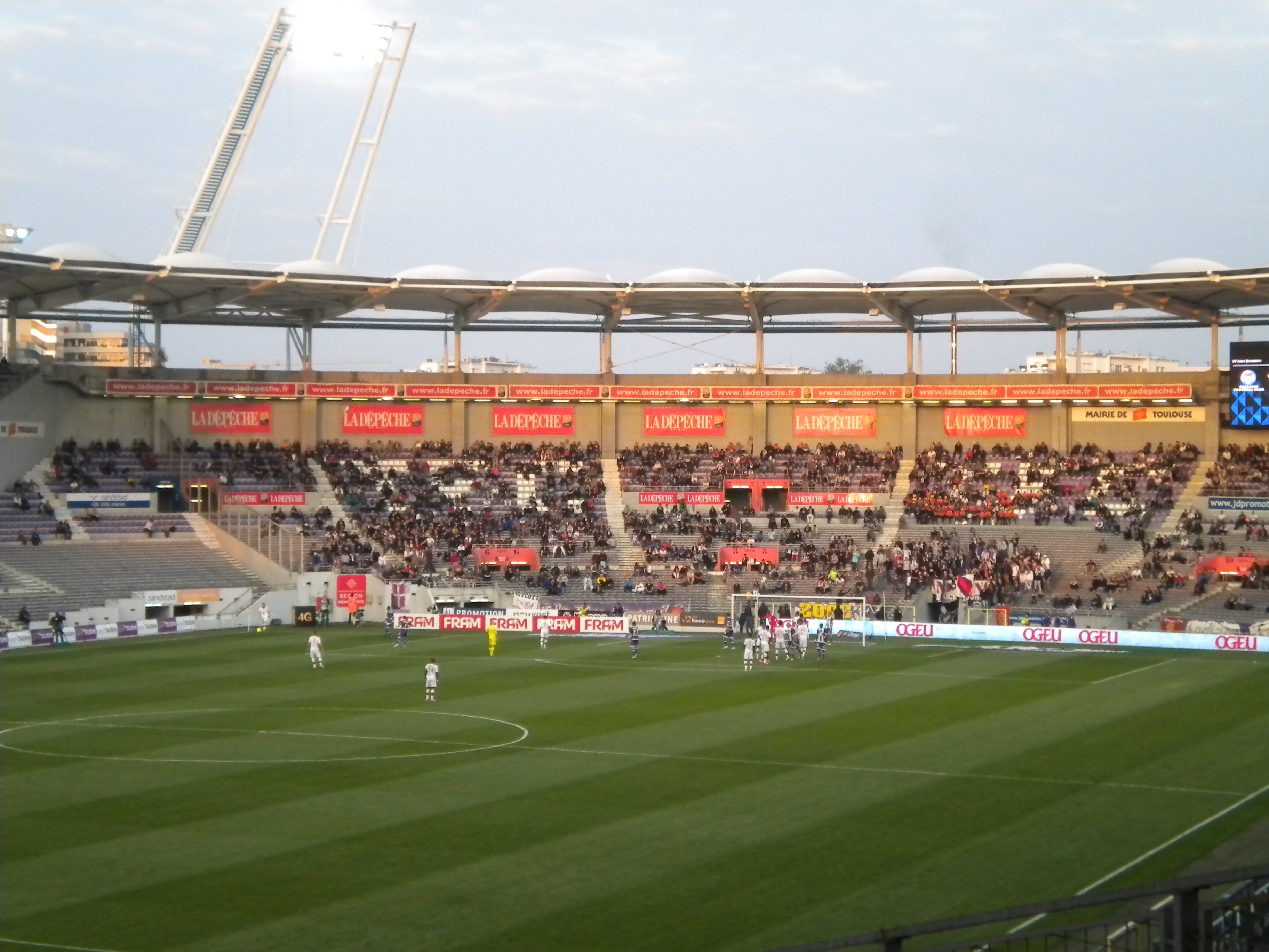 Le Stadium lors du match de Ligue 1 entre le Toulouse FC et le LOSC Lille du 5 mai 2013.